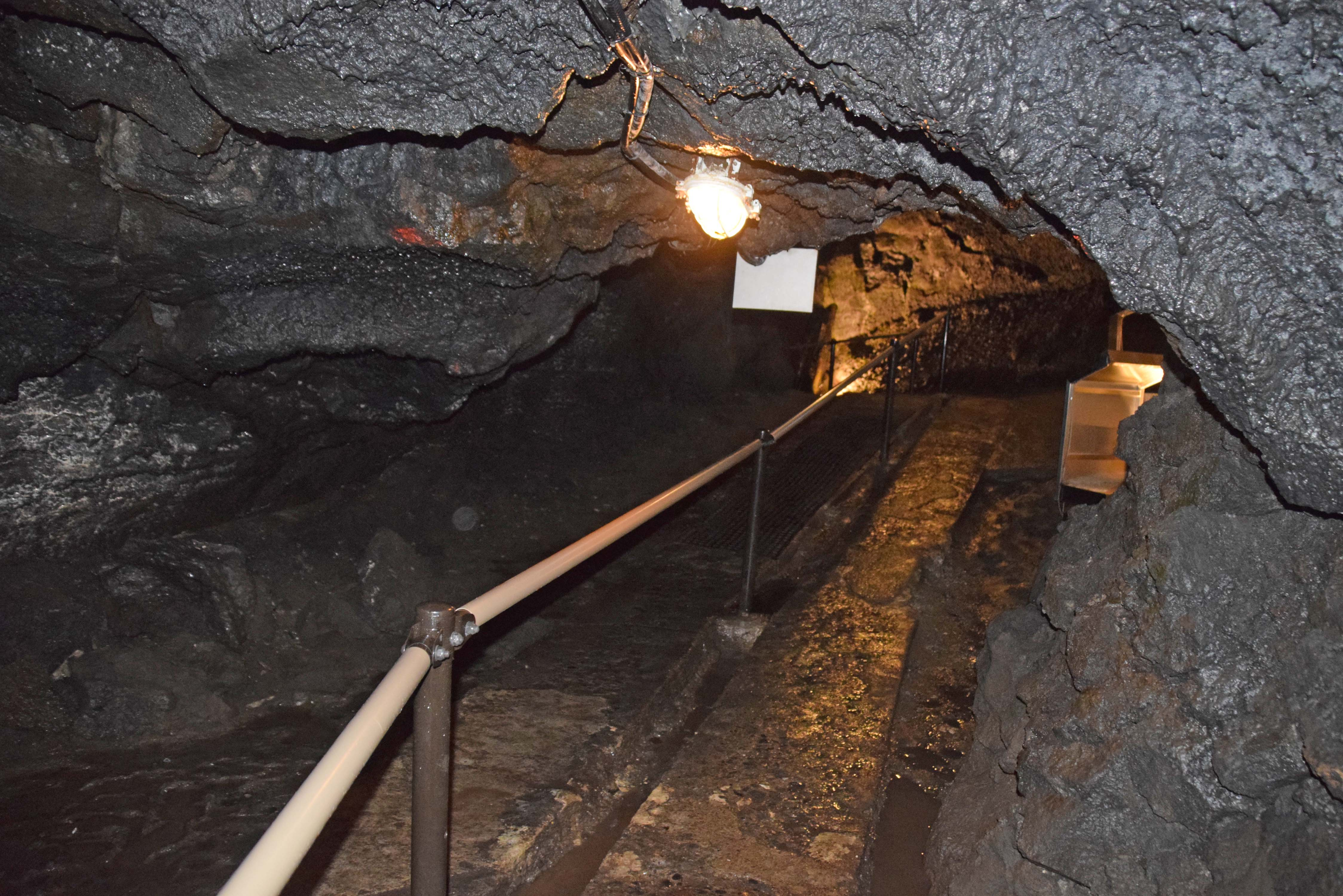 富岳風穴：風穴を歩く